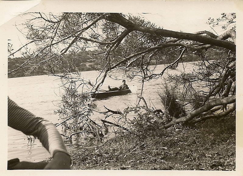 Vue vers l'ouest depuis la rive est du lac, vers les formations à Juniperus et Retama, au fond. Au 1er plan, Scirpus et Aulne